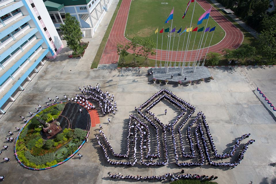 ลานพระบรมราชานุสาวรีย์ฯ โรงเรียนสวนกุหลาบวิทยาลัย รังสิต